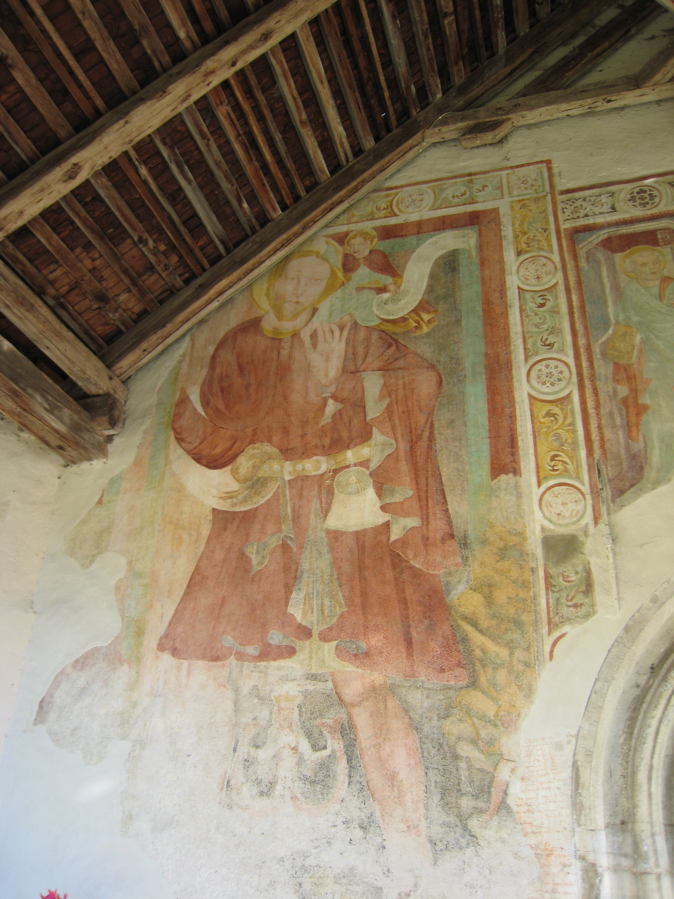 St Peter im Holz:Christophorus-Fresco